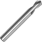 Foret NC à pointer, angle à 120°